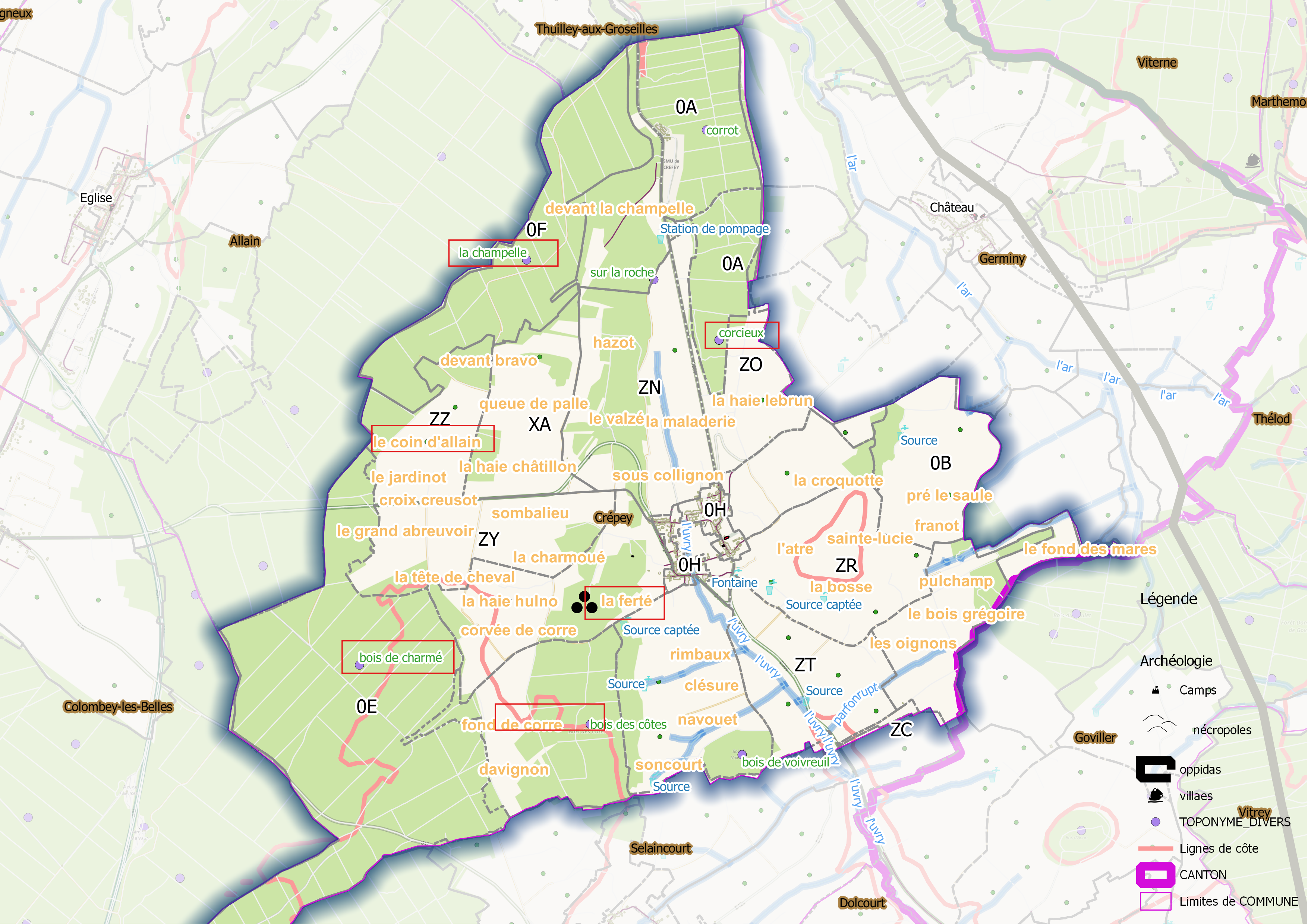 Crepey - ban communal (OSM et Qgis, mentions additionnelles)